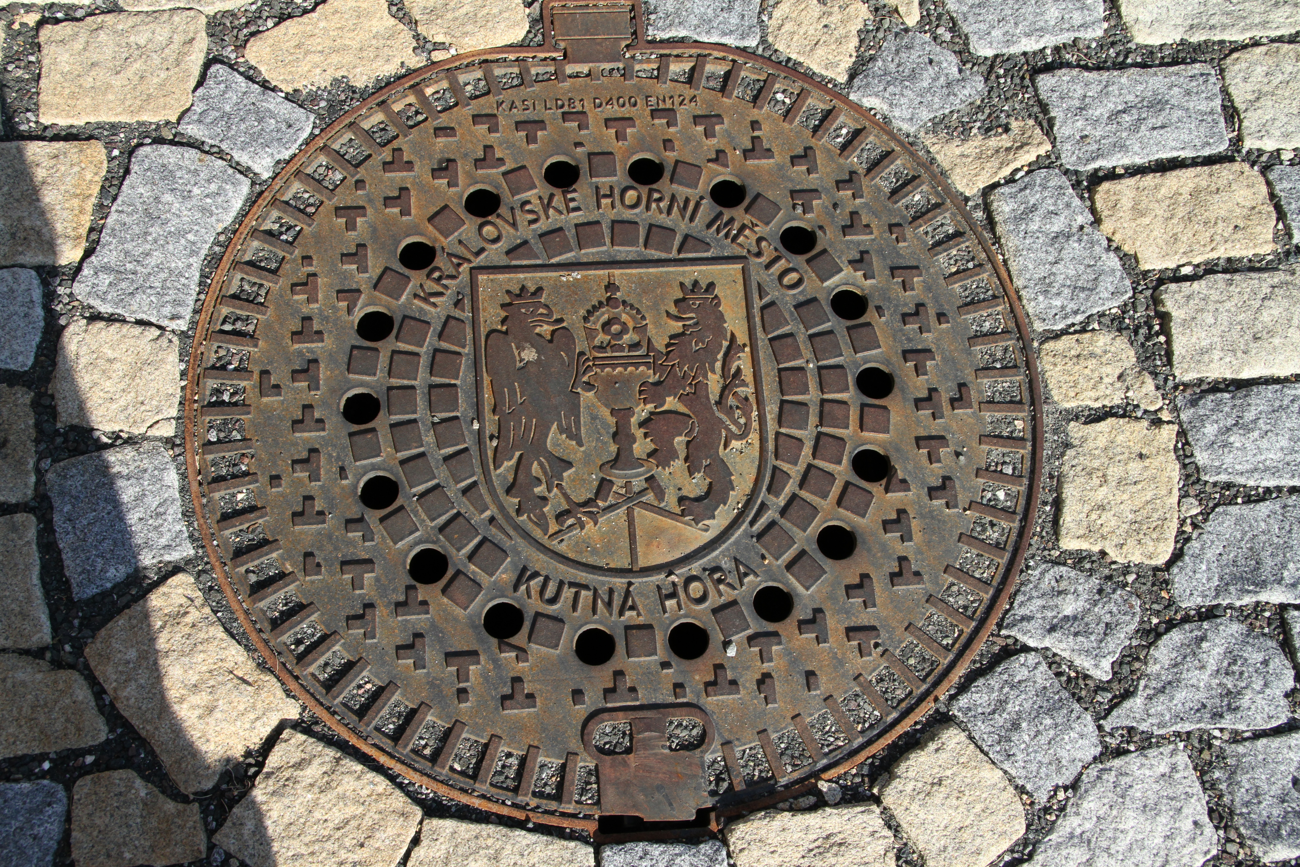 Kuttenberg, Kanaldeckel